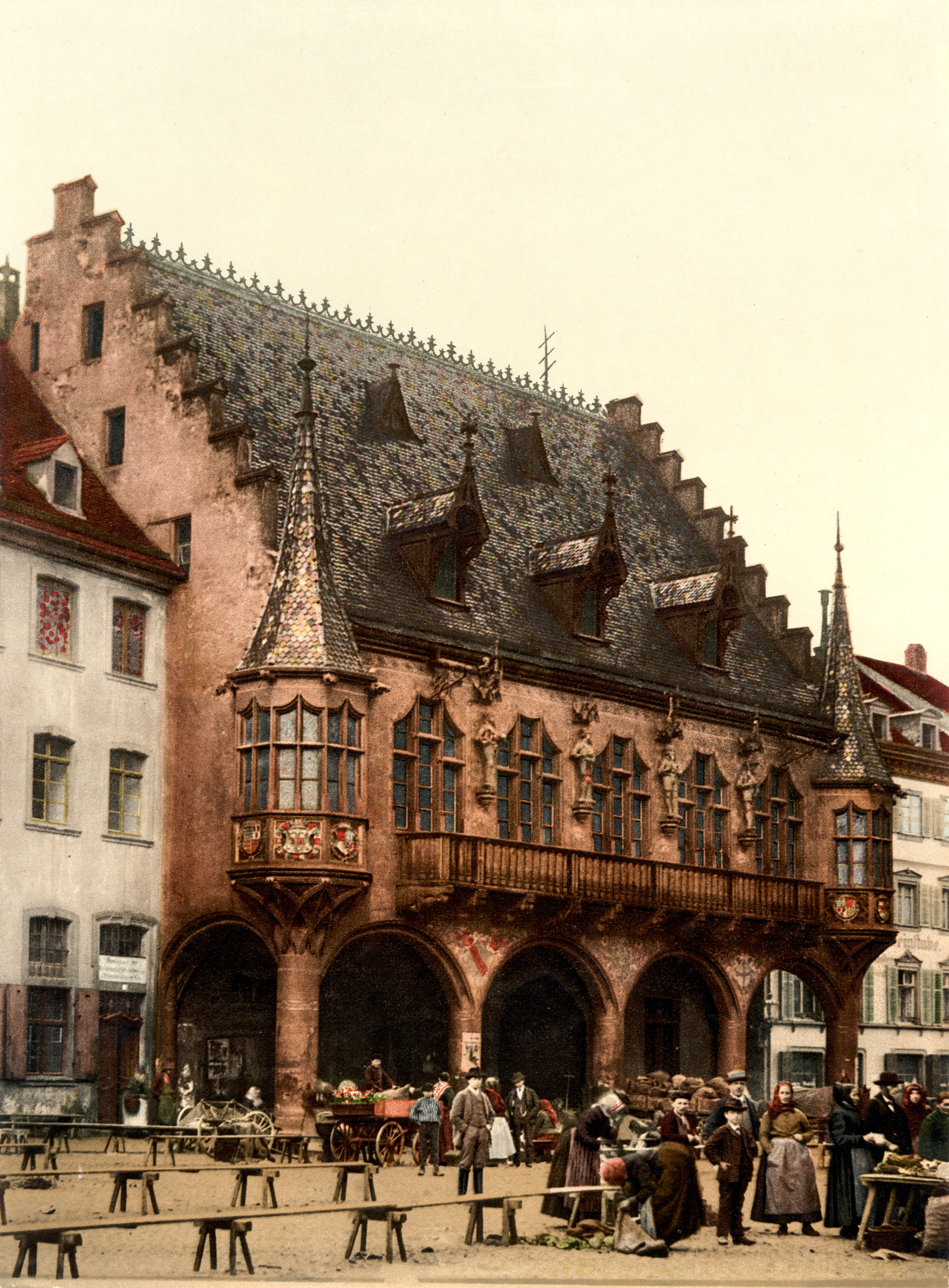 The market hall, Freiburg (Baden).